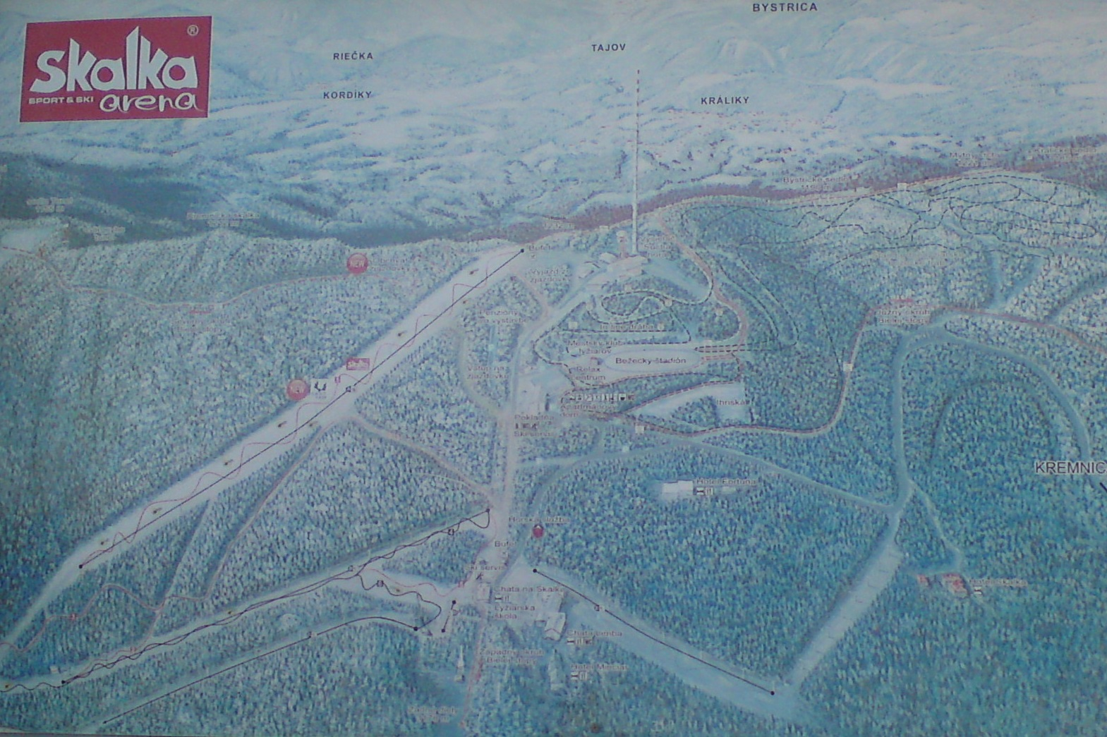 Mapa strediska Skalka